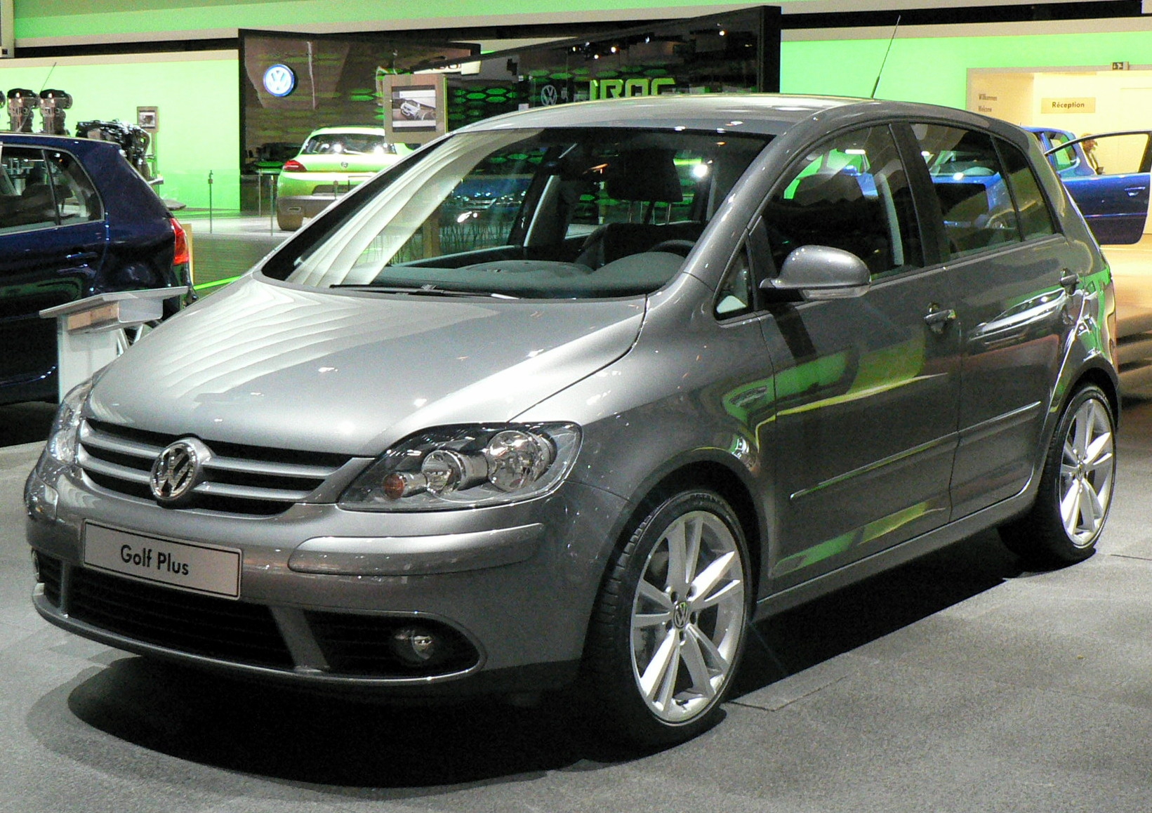 Mondial de l'automobile, Paris 2006